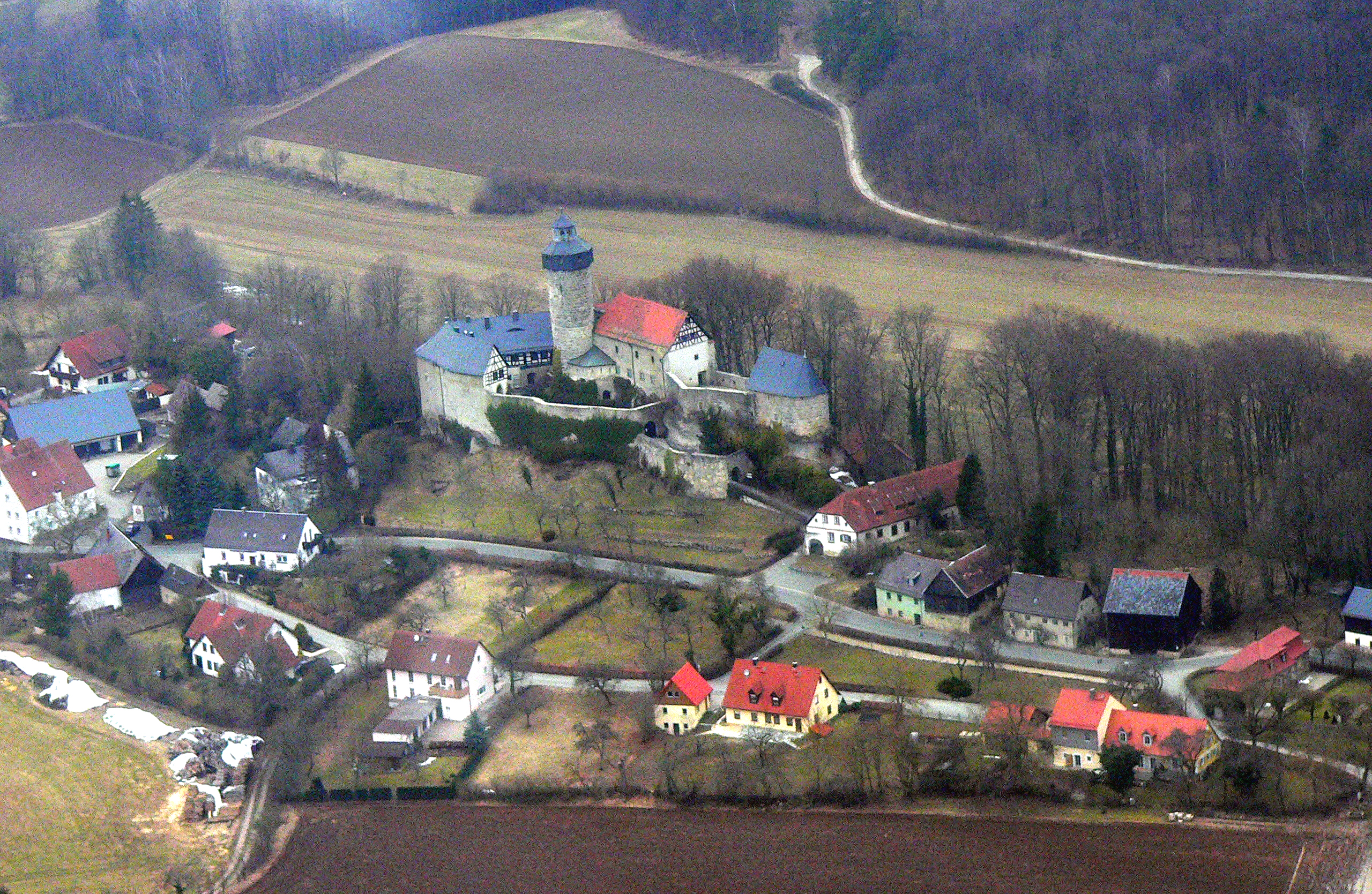 Sanspareil mit Burg Zwernitz, Ansicht von Süden - Fränkische Schweiz, Bayern